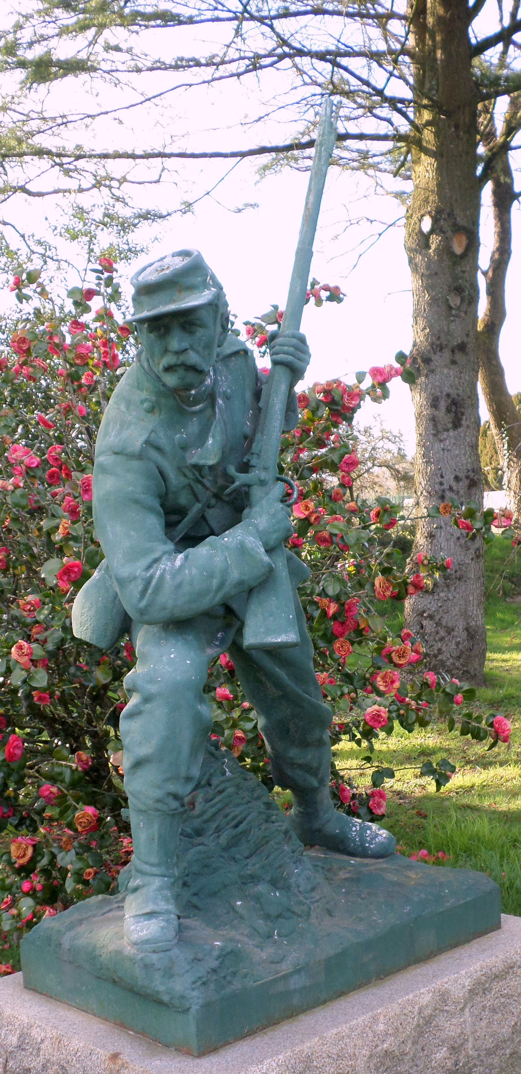 Delwenn ur soudard breizhat eus Lu Breizh, Brezel 1870-1871, Santez-Anna-Gwened.